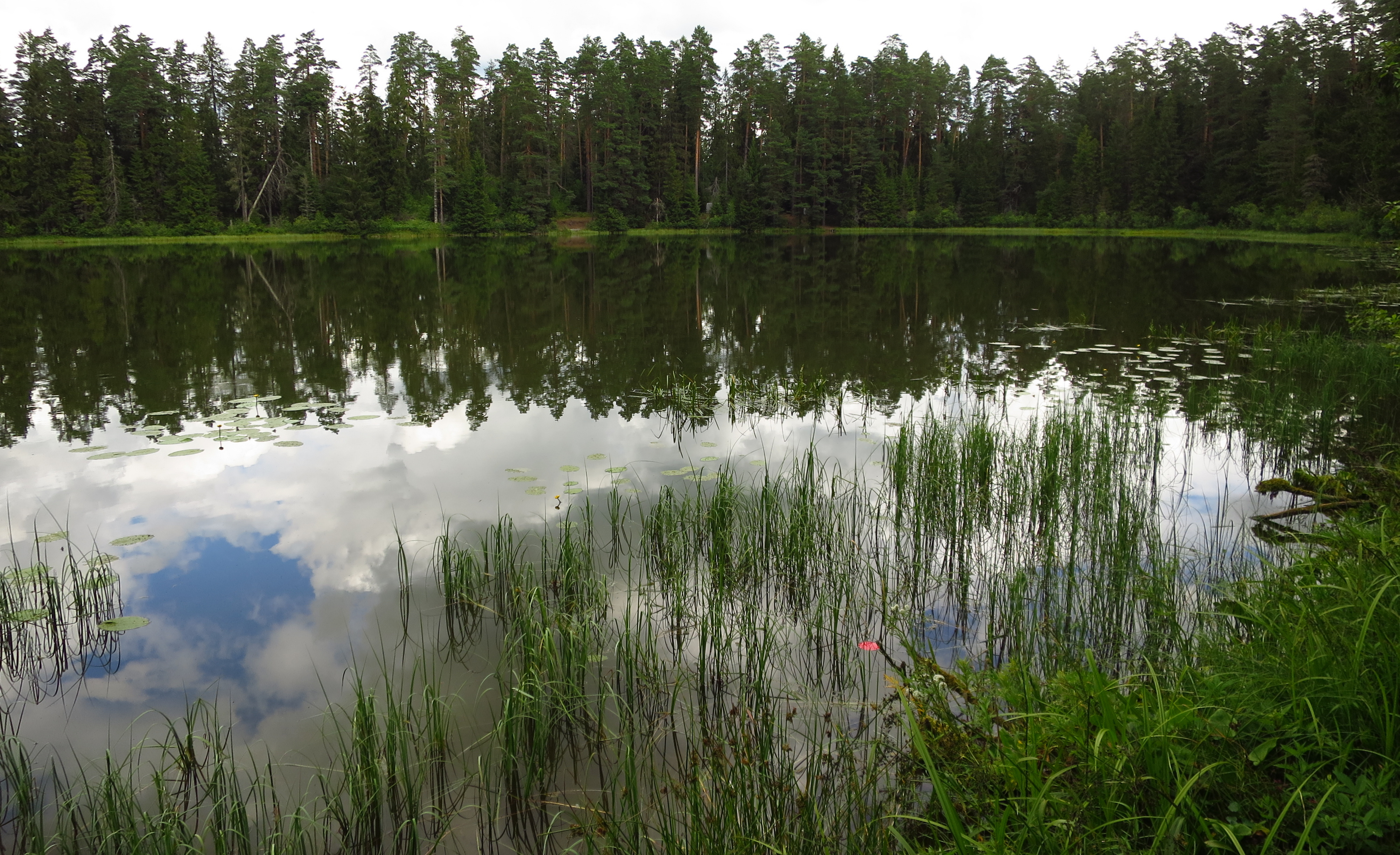 Kooraste Linajärv